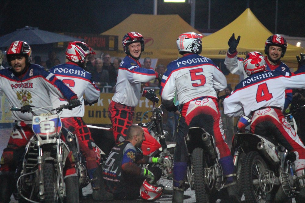 Sélection national de Russie de Motoball